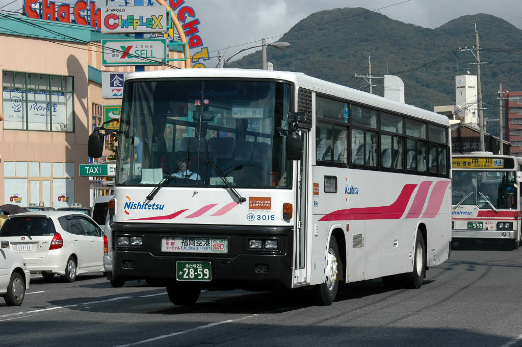 旧車両